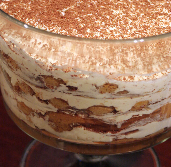 Tiramisu